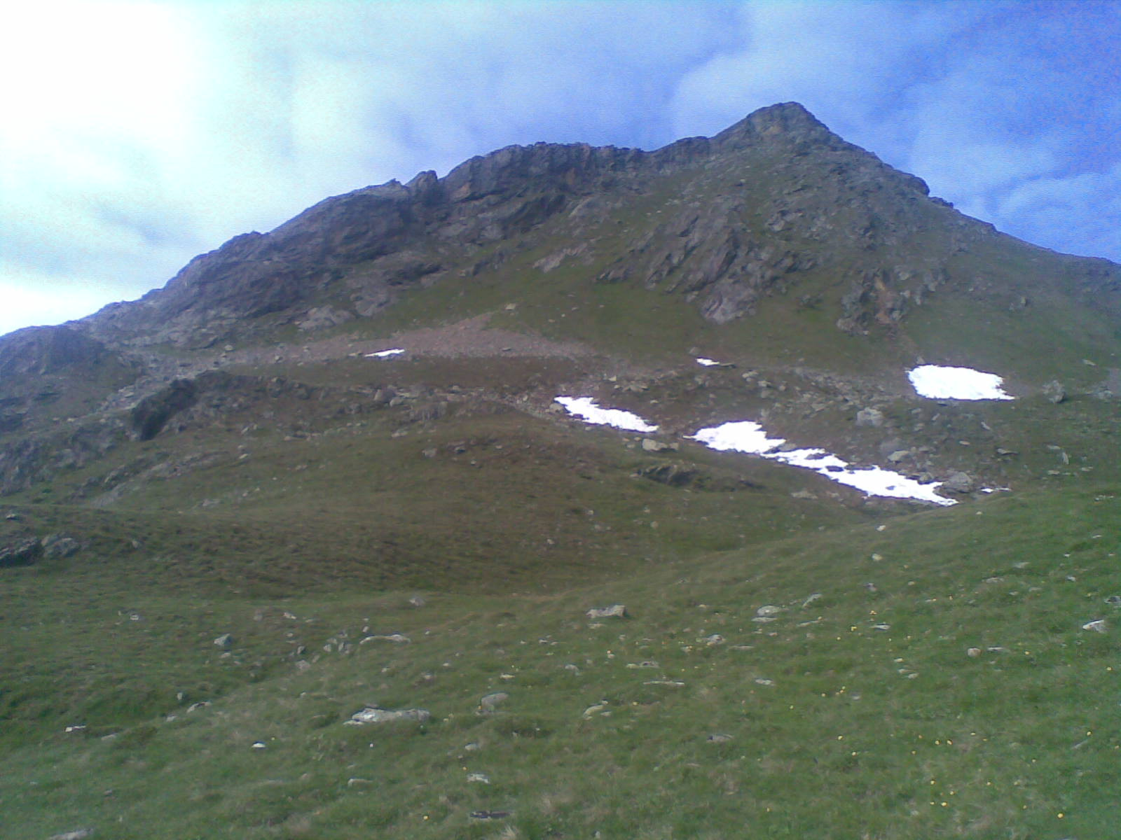 La vetta a punta del Castel Pagan visto dalla Val di Bresimo